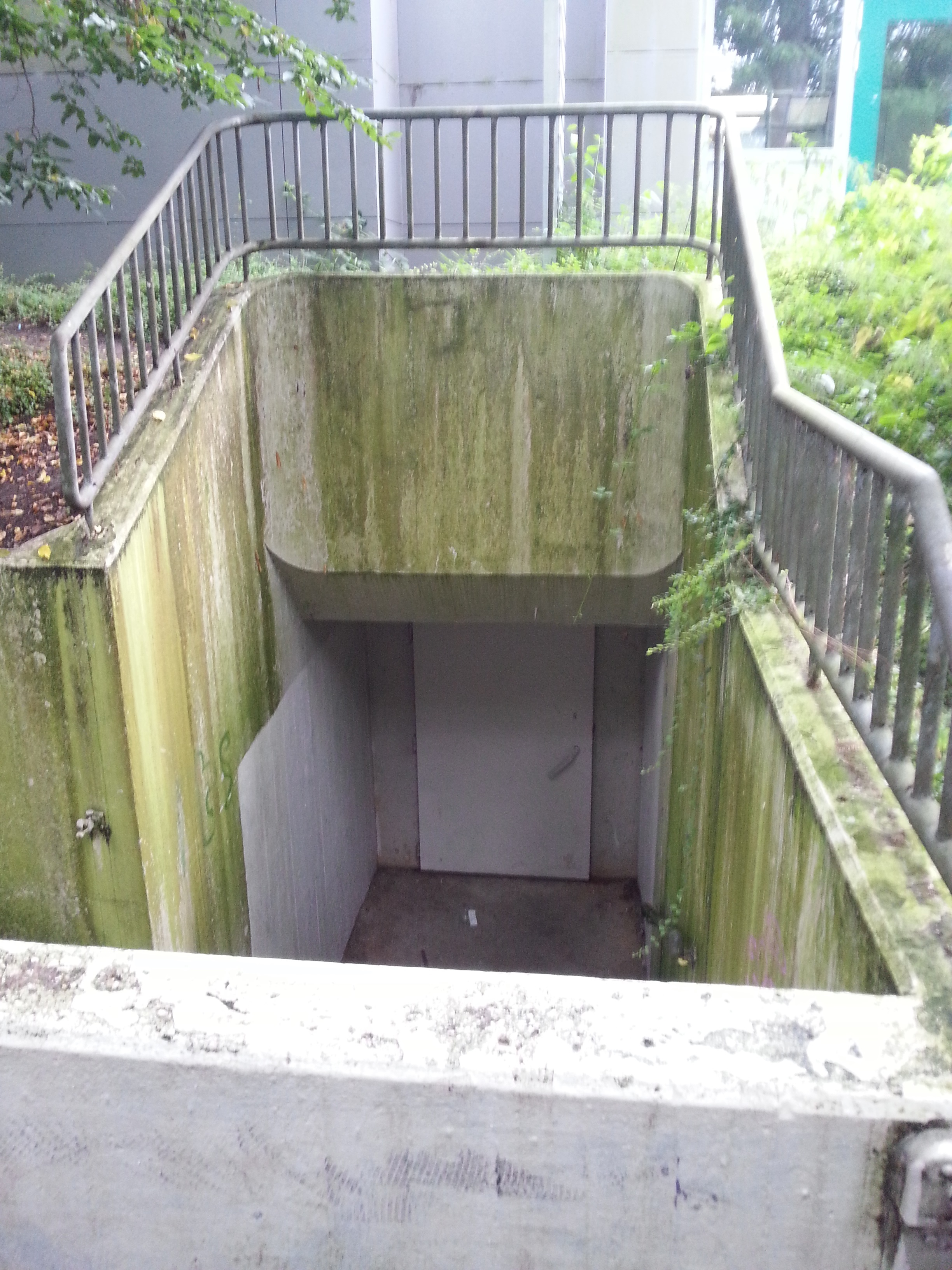 Einer der Nebeneingänge des Krankenhauses.